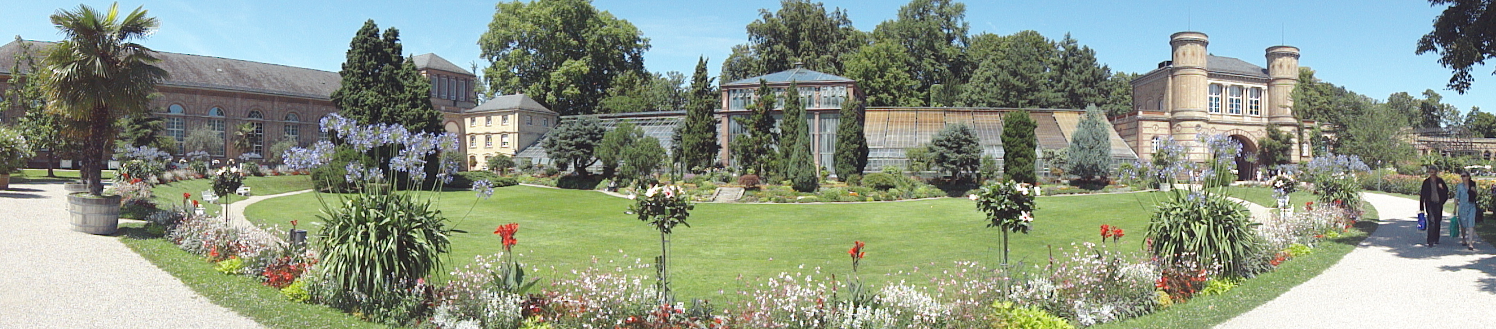 Panorama des Botanischen Gartens Karlsruhe. Das Bild zeigt (v.l.n.r) die Orangerie und Staatliche Kunsthalle, die Gewächshäuser und den Wintergarten, sowie das Torhaus des Gartens.